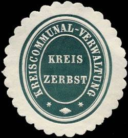 Sealing stamp Title: Kreiscommunal - Verwaltung Kreis Zerbst Description: grün, weiß, geprägt Place: Zerbst size: 4x3 cm